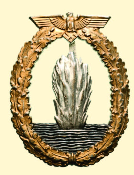 Minensuchabzeichen 1939